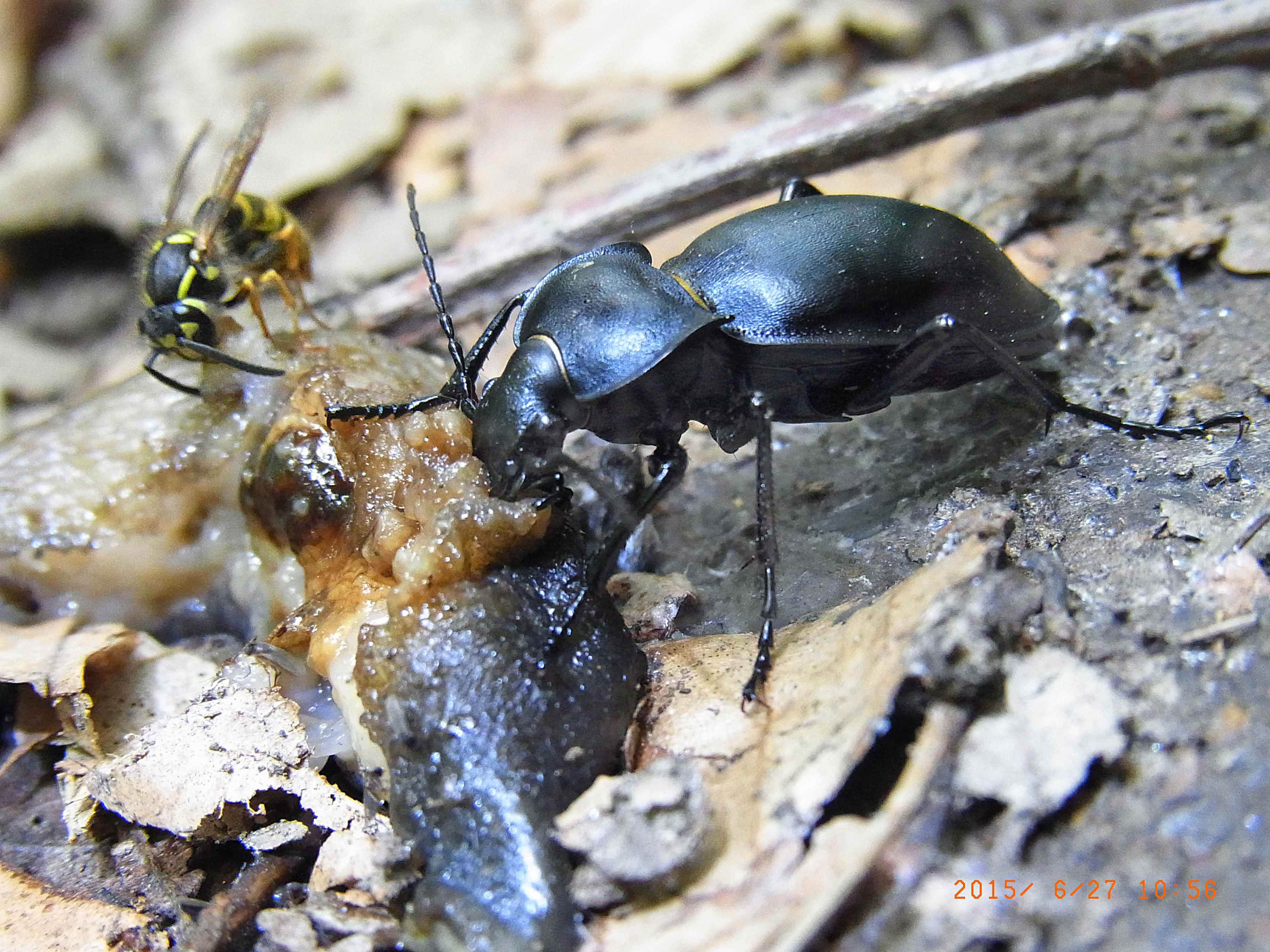 Carabus glabratus Ungarn, Mátra-Bergland, bei Sasvár auf einem steilen Wanderweg über einem Rinnsal am 27. Juni 2015 so gegen 11 Uhr, mit Wespe, beim Fressen einer Nackschnecke